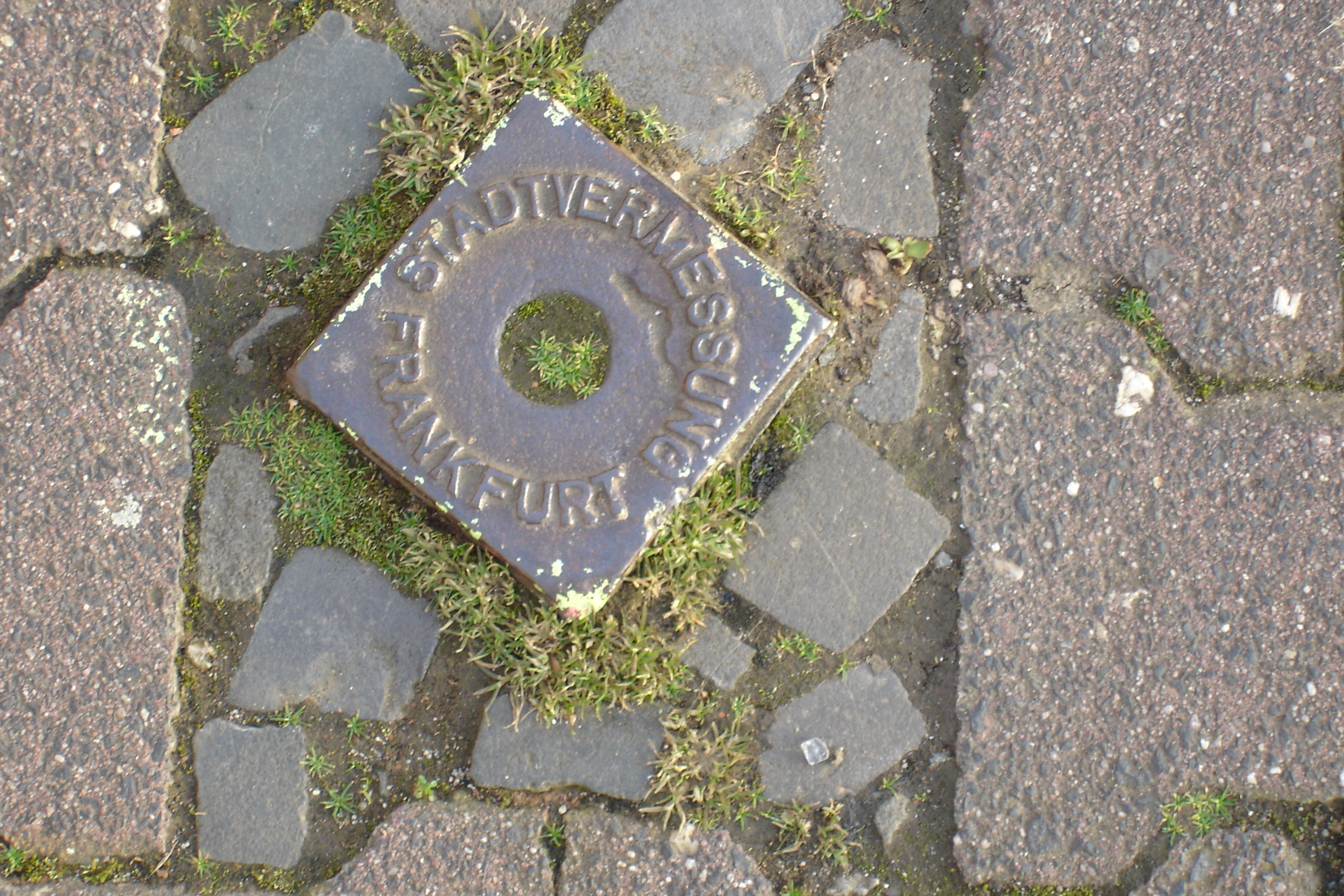 Vermessungspunkt in Frankfurt am Main